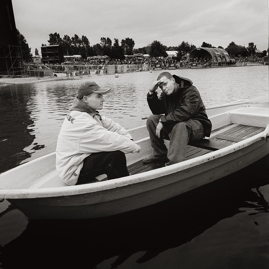 Splash